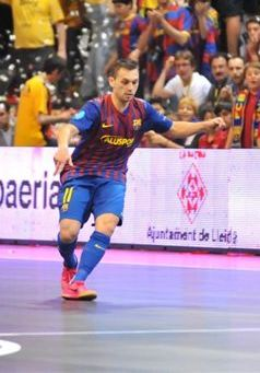 Saad Assis, giocatore italo-brasiliano di futsal